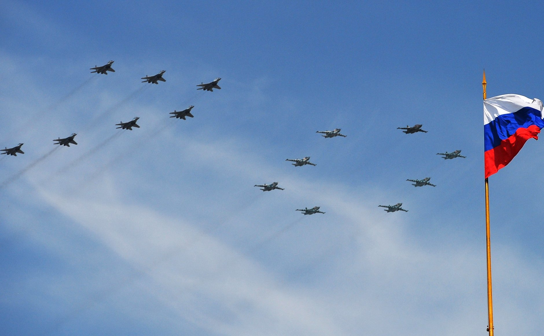 Многоцелевые истребители МиГ-29 и штурмовики Су-25 во время военного парада в ознаменование 70-летия Победы в Великой Отечественной войне 1941–1945 годов.